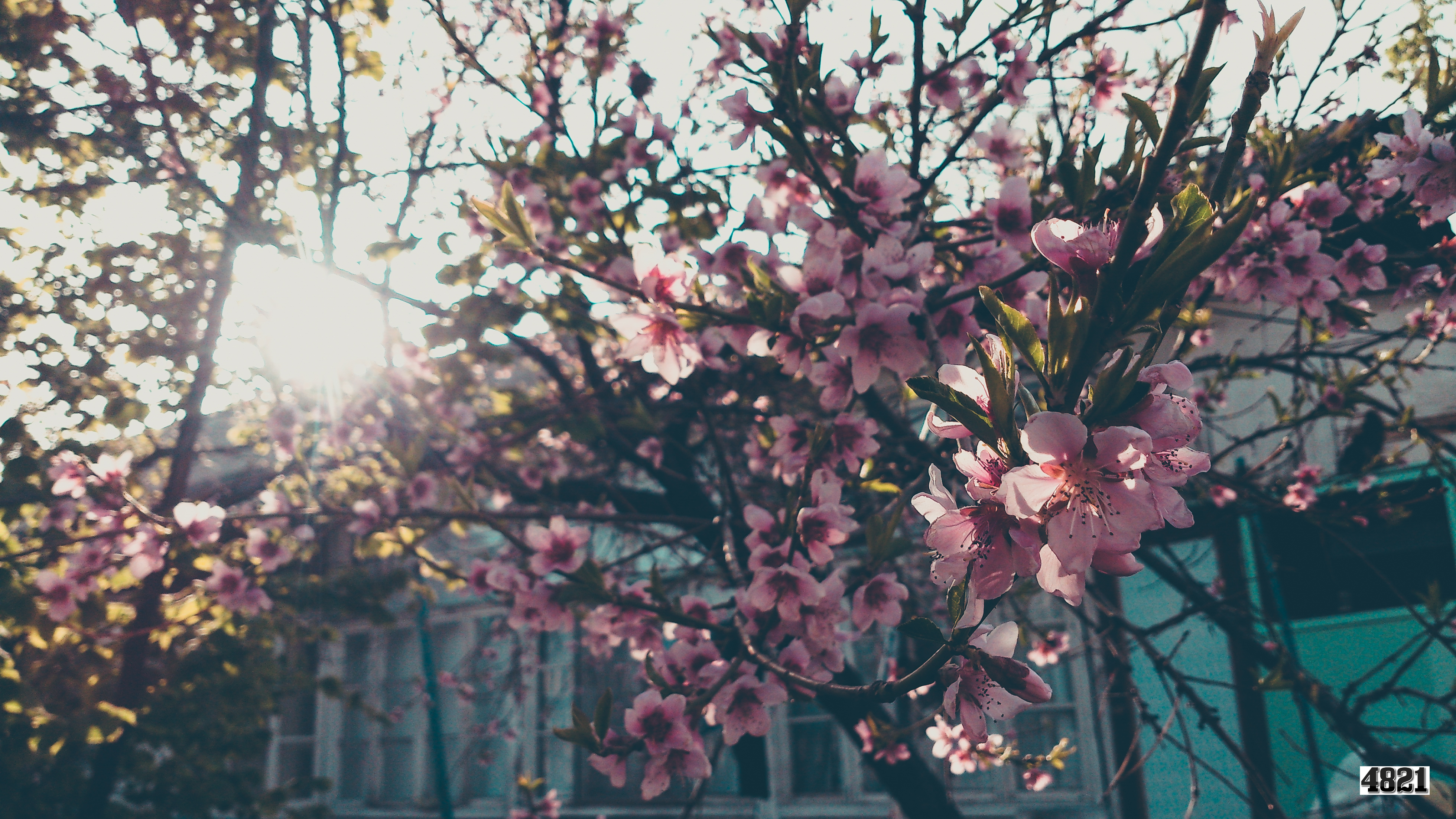 bahar cicekleri